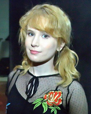 Фотография Елизаветы Гырдымовой, сделанная в Новосибирске